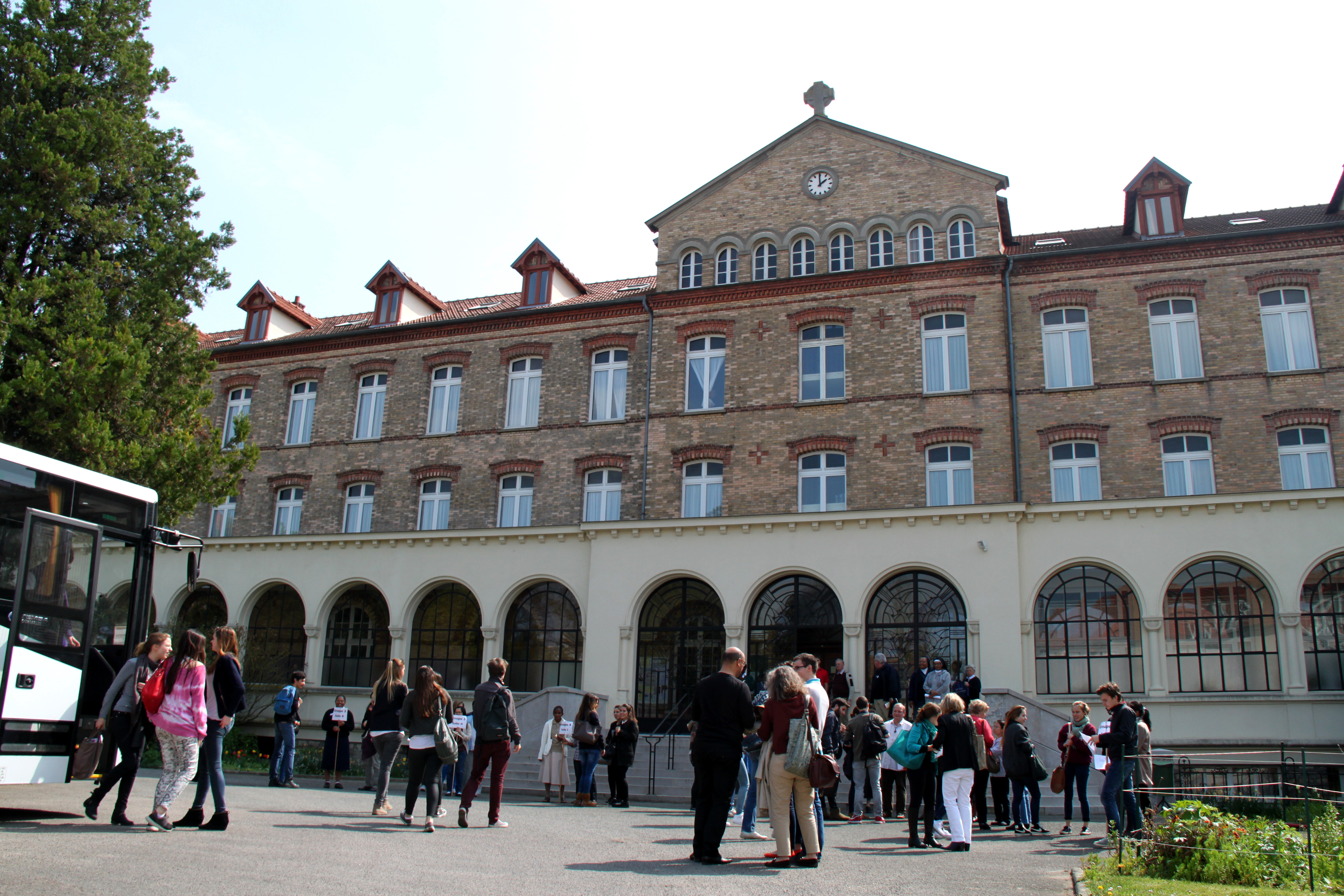 Façade principale du centre d'accueil de groupes.